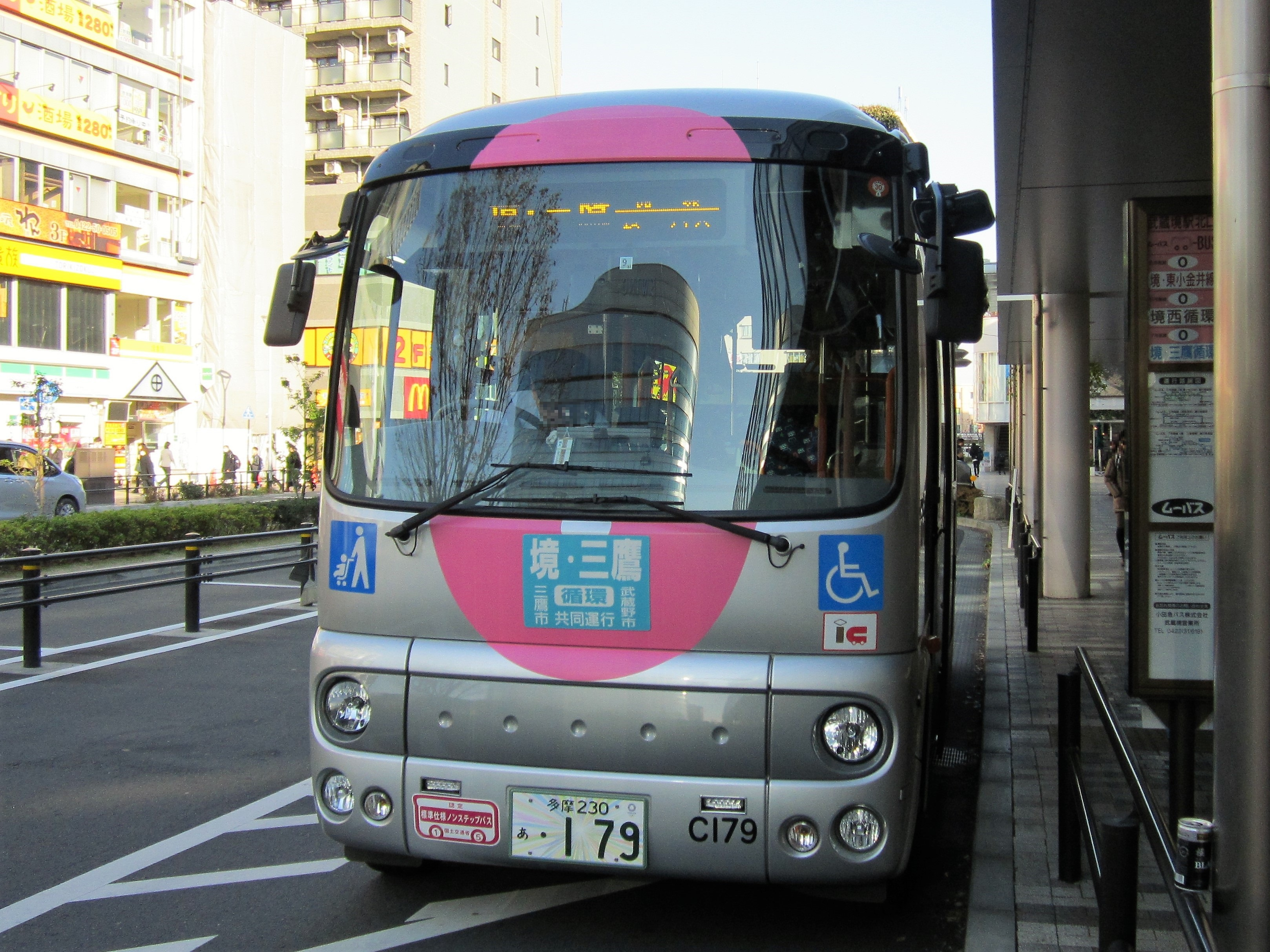 武蔵境駅北口0番乗り場に停車中の「ムーバス」境・三鷹循環 Canon PowerShot A2200